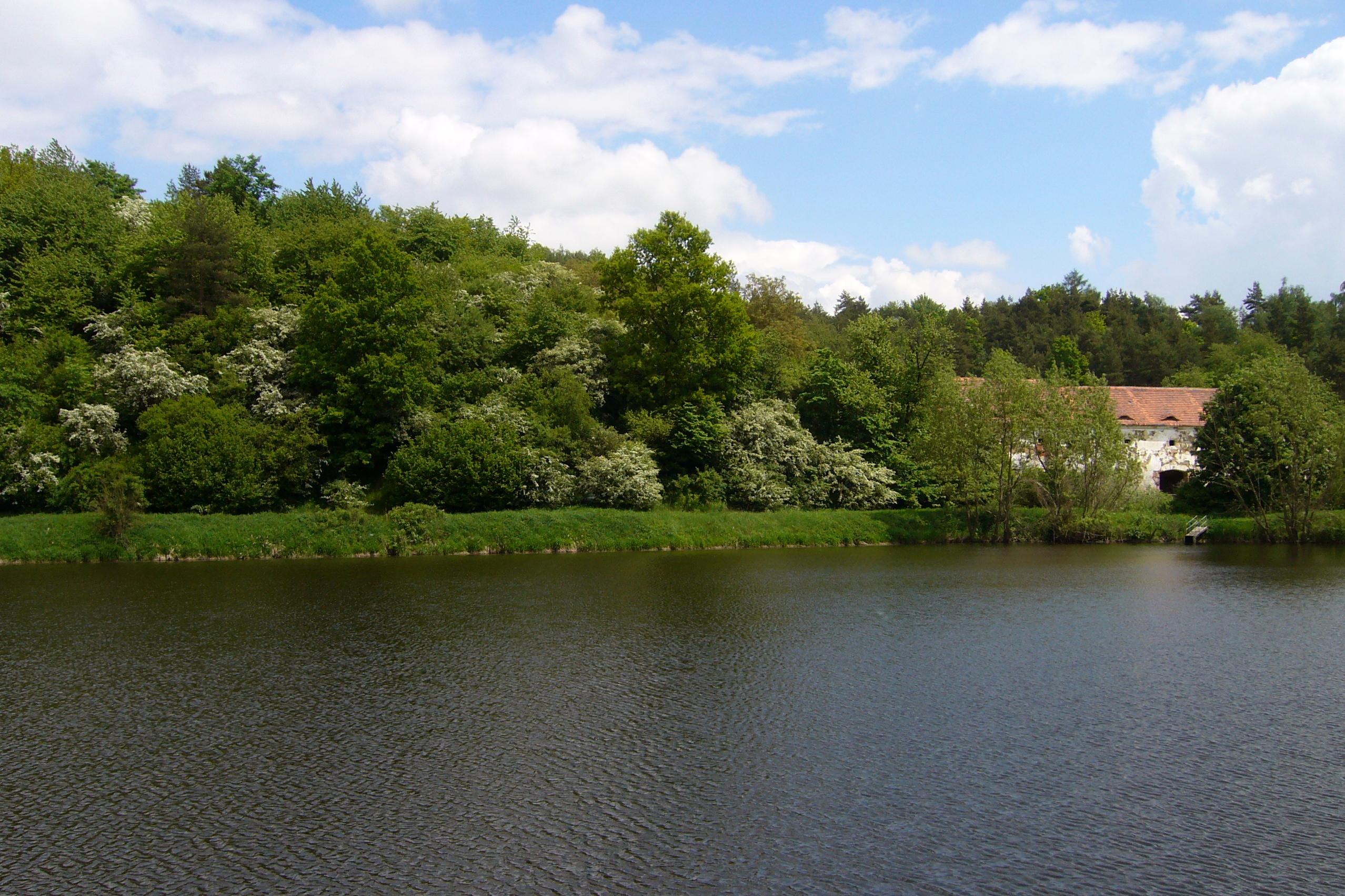 Celkový pohled na hradní vrch, Podmokly (Úněšov).